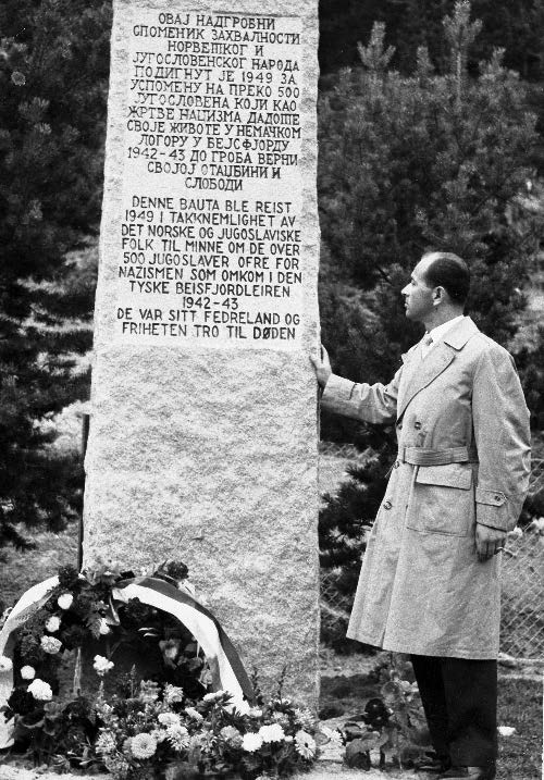 yugoslav survivor